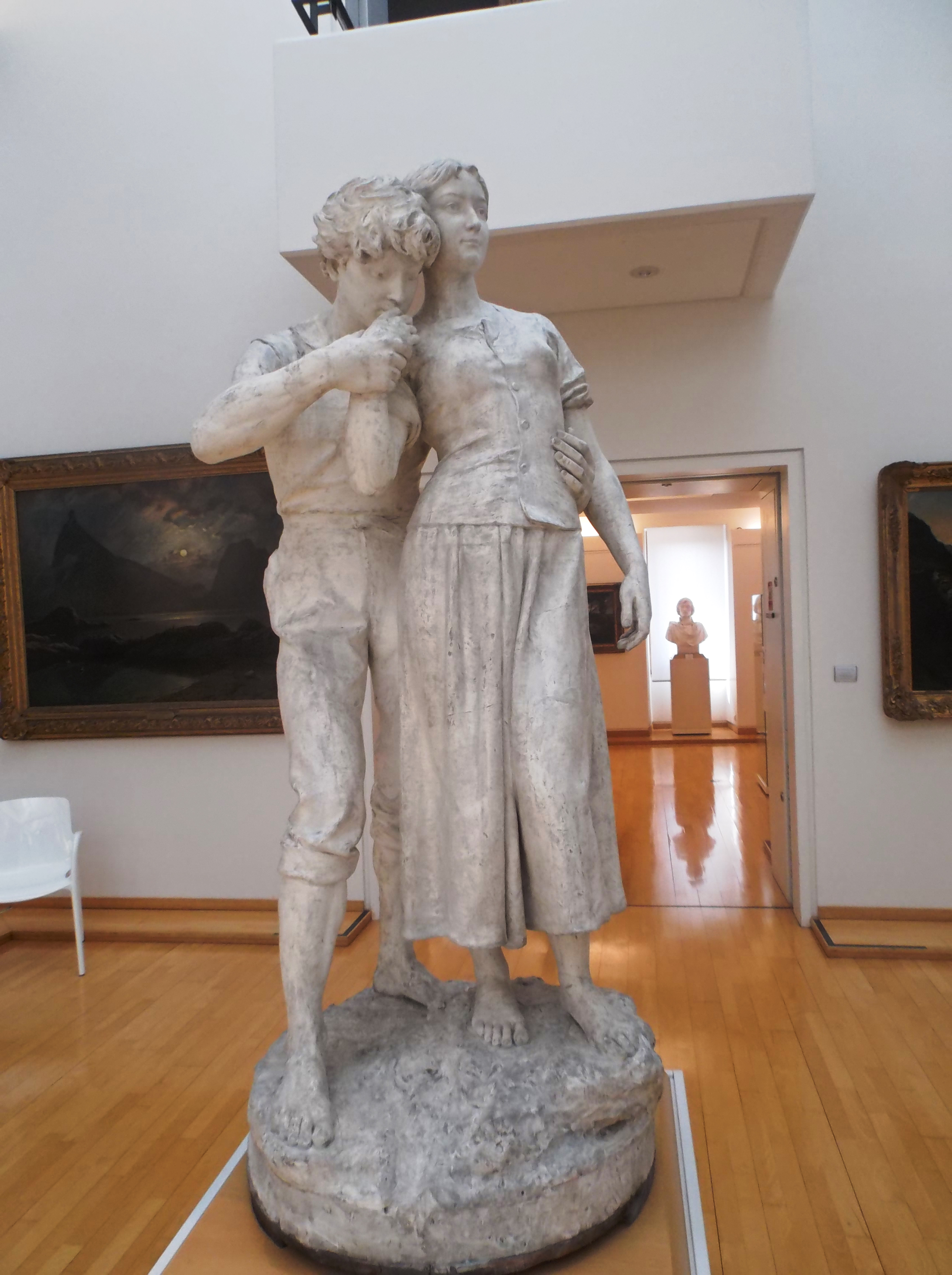 Idylle. Groupe sculpté par Jean-Ossaye Mombur (Ennezat, 1850 - Vichy, 1896). Plâtre original présenté au Salon de 1890. Inv. 56.129.1. Musée d'art Roger-Quilliot, Clermont-Ferrand (France). Don au musée par Mme Mombur, veuve de l'artiste, en 1912.